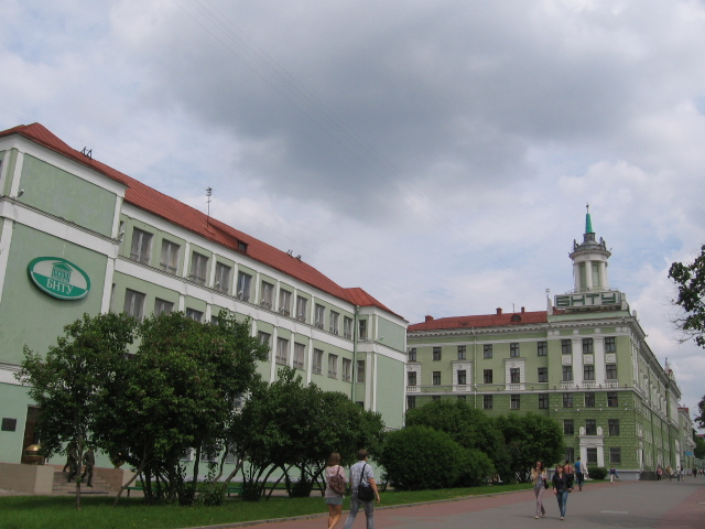 Минск. Учебный корпус и общежития БНТУ